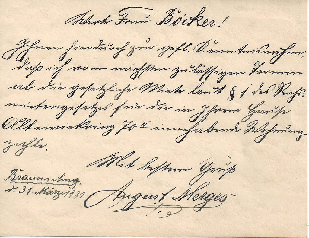 August Merges kündigt seiner Vermieterin an, demnächst die gesetzlich festgesetzte Miete zu zahlen.